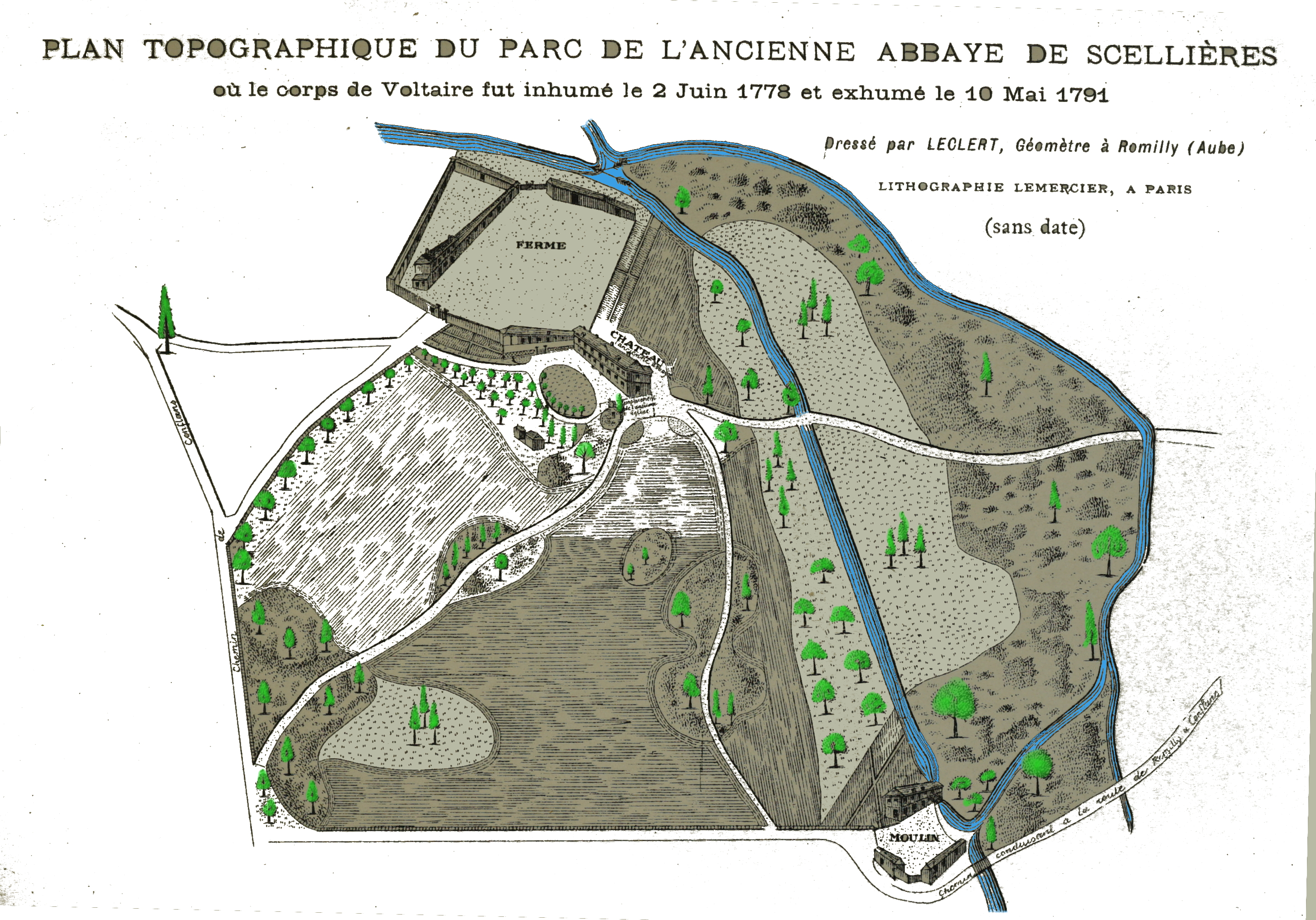 Image de l'abbaye.